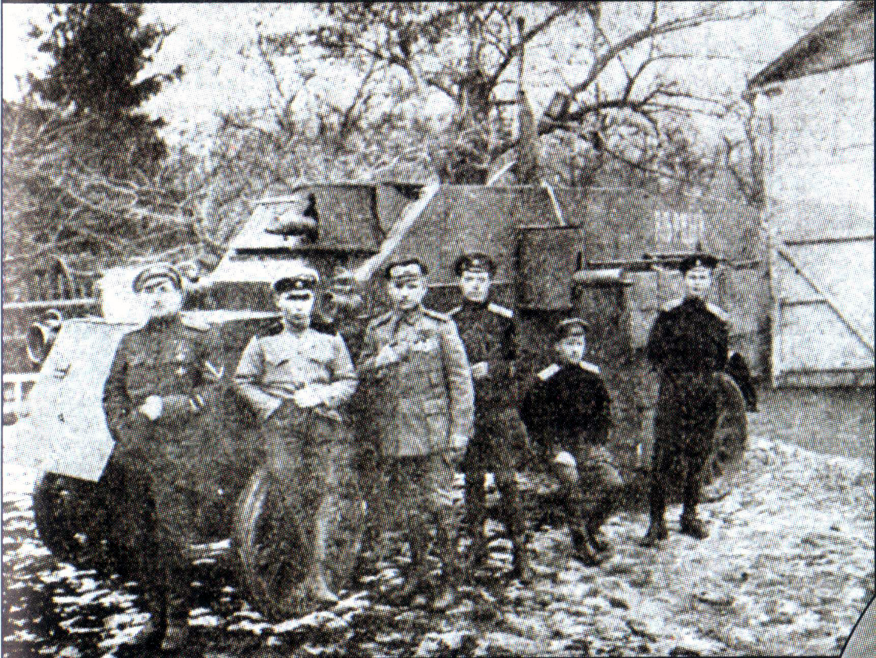 Команда бронеавтомобиля "Верный". 1918. Из журнала "Вестник Галлиполийцев в Болгарии"